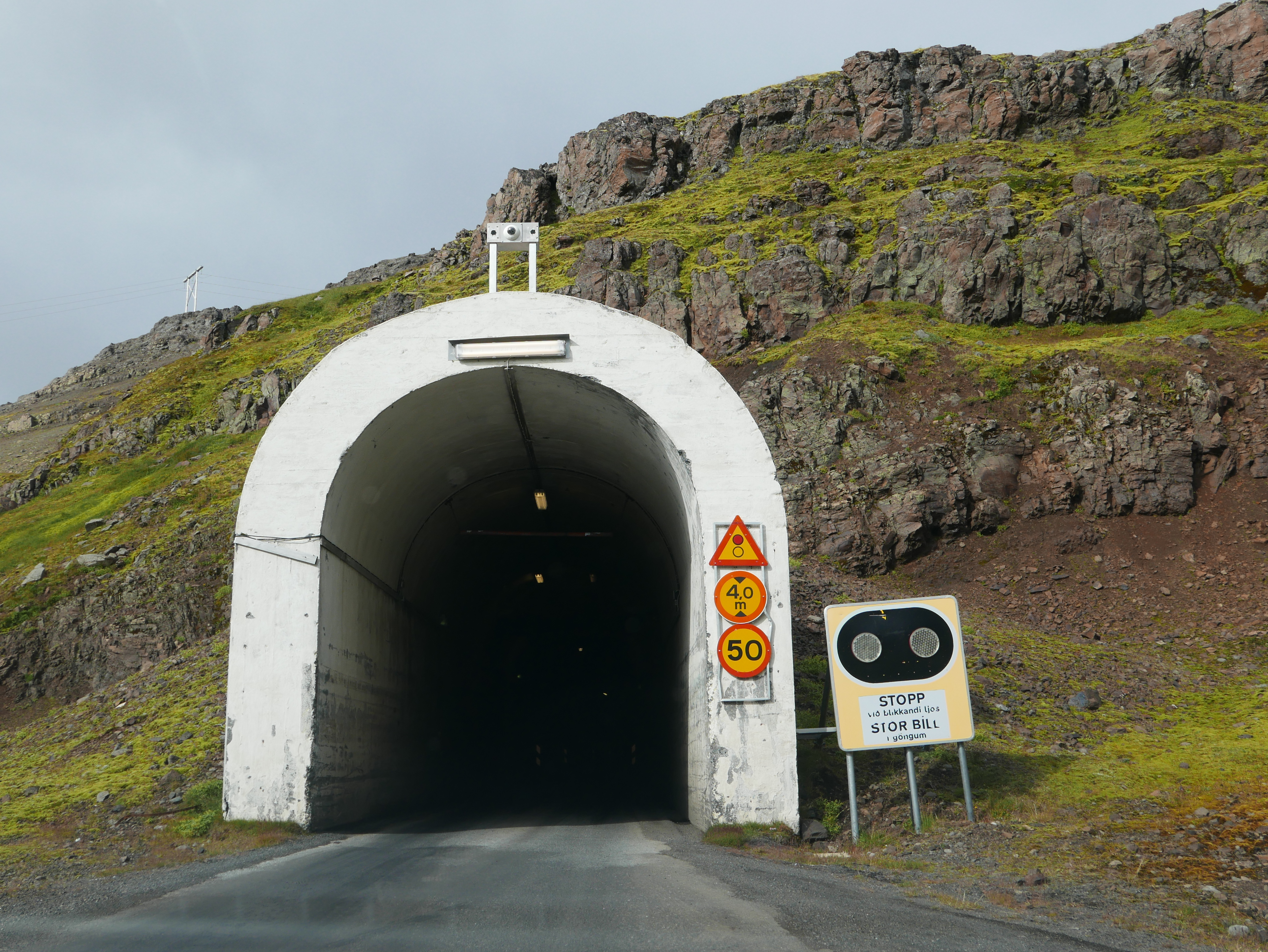 Imatge del túnel d'Oddsskarðgöng, a Islàndia